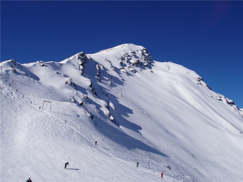 Третья очередь Чегета - бугельный подъёмник. Вид с вершины второй очереди Чегета.